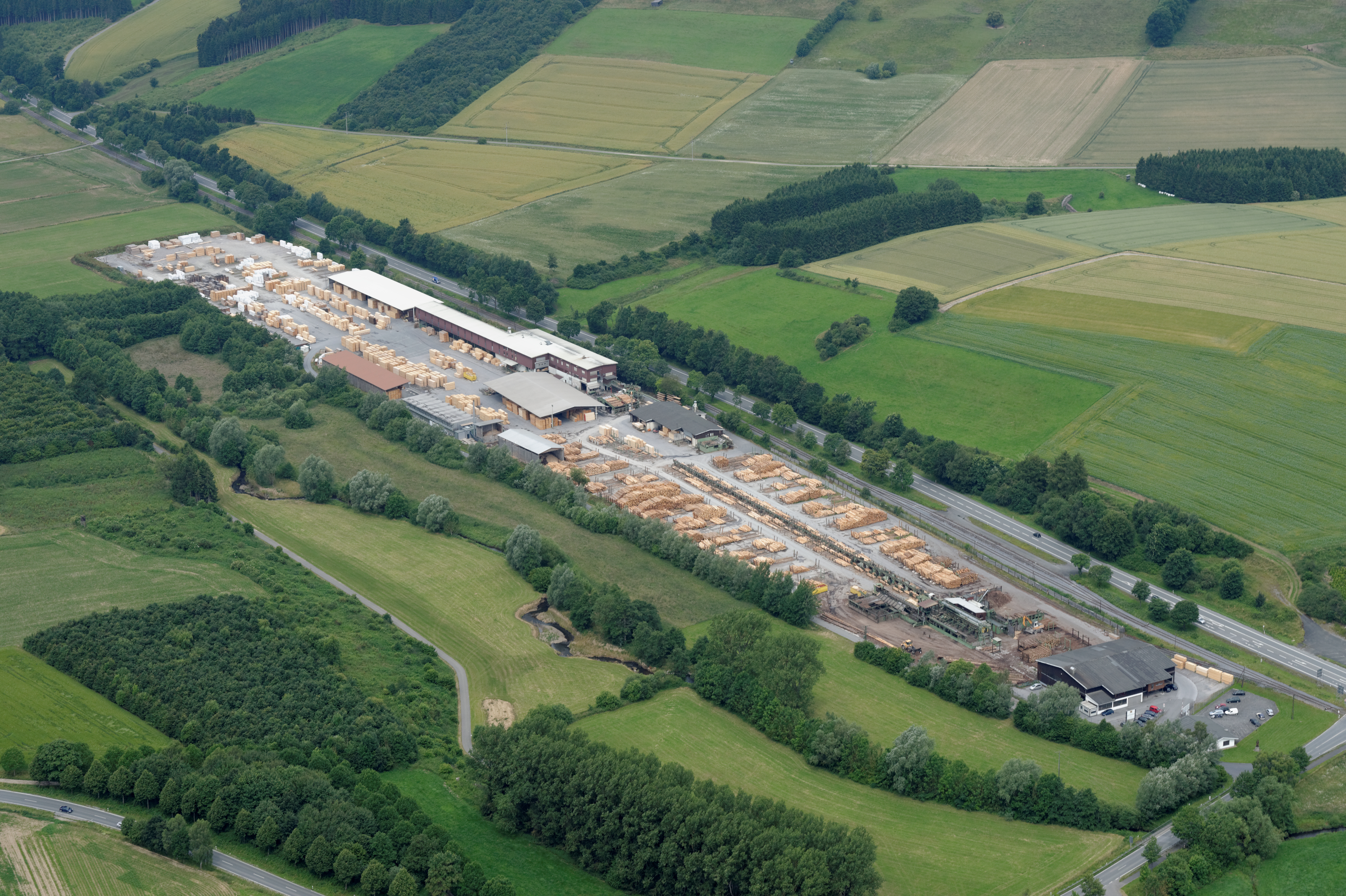 Fotoflug Sauerland-Nord. Sägewerk der Firma Fisch an der Bundesstraße 516 südwestlich von Rüthen, Landesstraße 793, vorne Naturschutzgebiet Möhnetal (SO-015), Blickrichtung Nordwest The making of this document was supported by the Community-Budget of Wikimedia Germany.